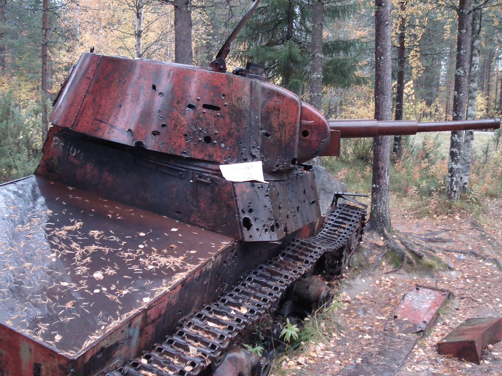 T-26 Model 1939 in Suomussalmi.